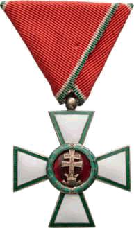 Magyar Érdemrend lovagkeresztje hadidíszítménnyel